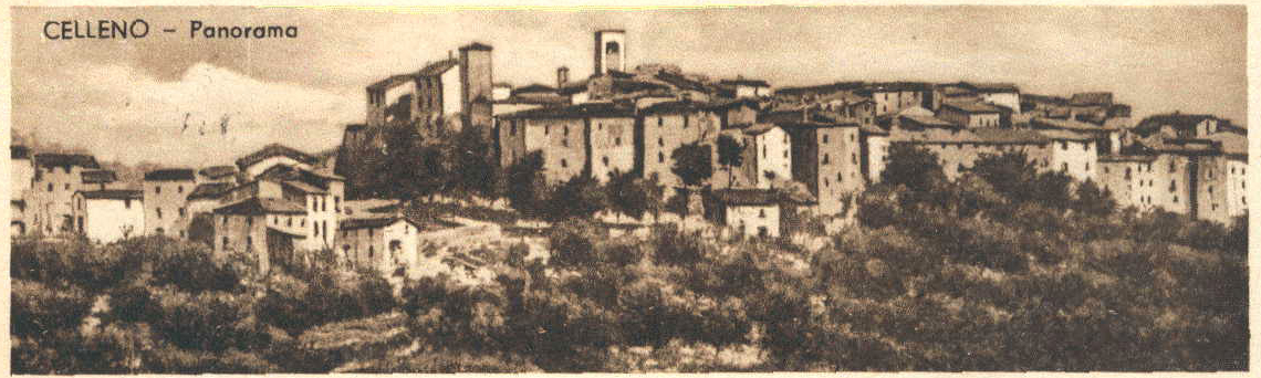 Panorama di Celleno in una vecchia cartolina